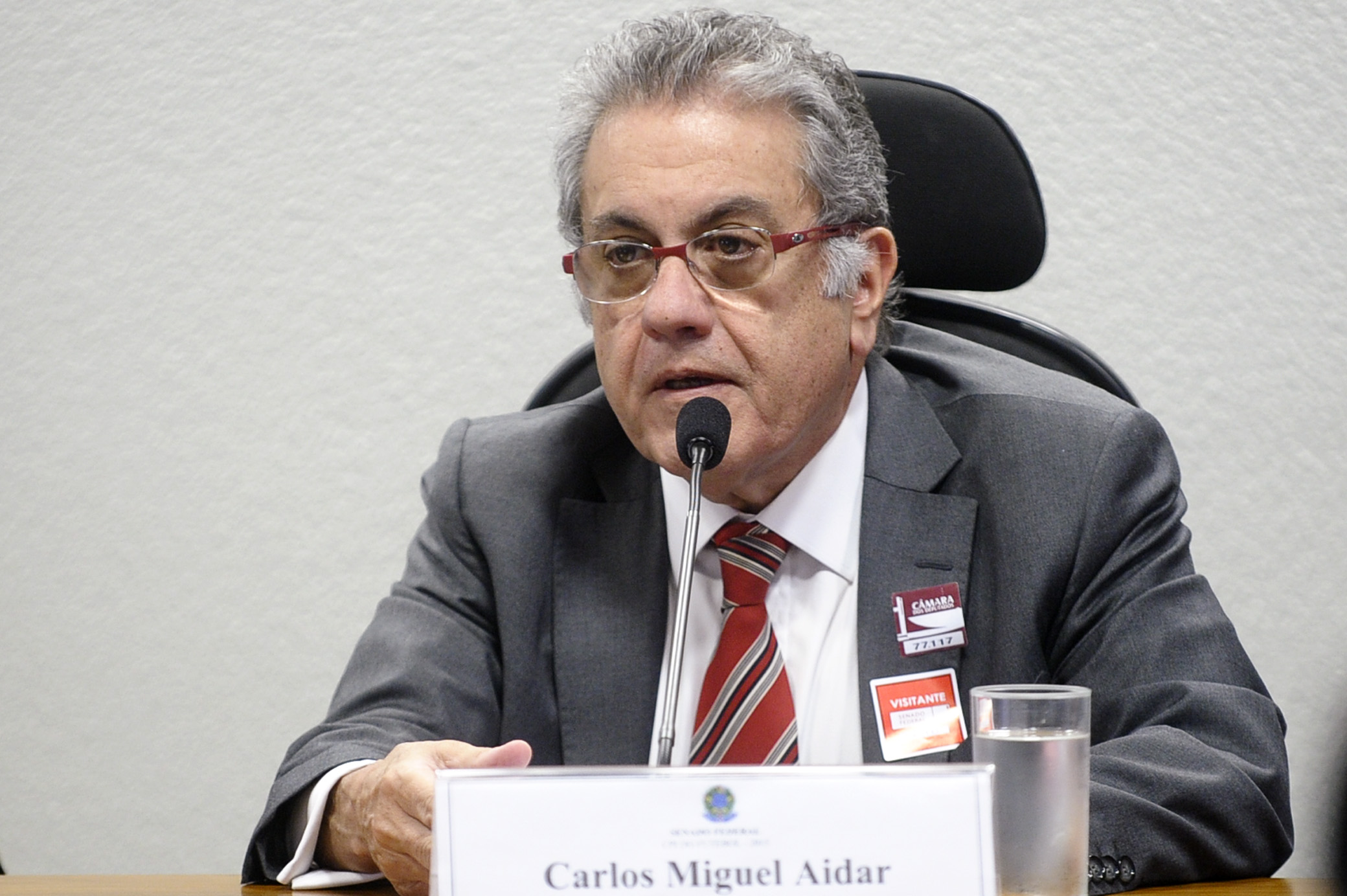 A CPI do Futebol (CPIDFDQ) realiza audiência pública com a participação dos presidentes do São Paulo Futebol Clube e do Santos Futebol Clube. Em pronunciamento, presidente do São Paulo Futebol Clube, Carlos Miguel Aidar. Foto: Marcos Oliveira/Agência Senado.